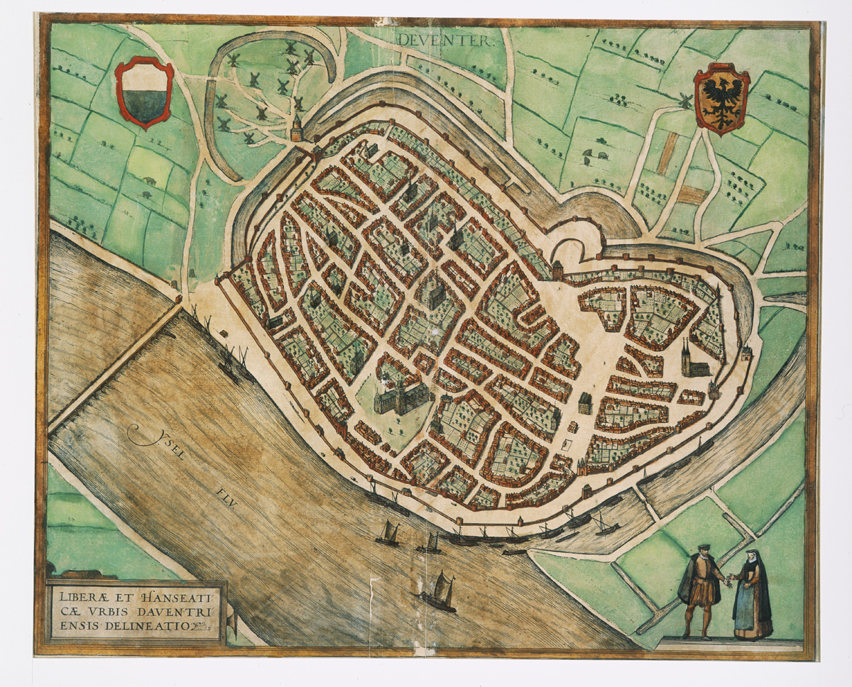 Stadsplattegrond van Deventer (16de eeuw) uit het werk van Ludovico Guicciardini: Discrettione di tutti i Paess (Beschrijvinghe van alle de Nederlanden).